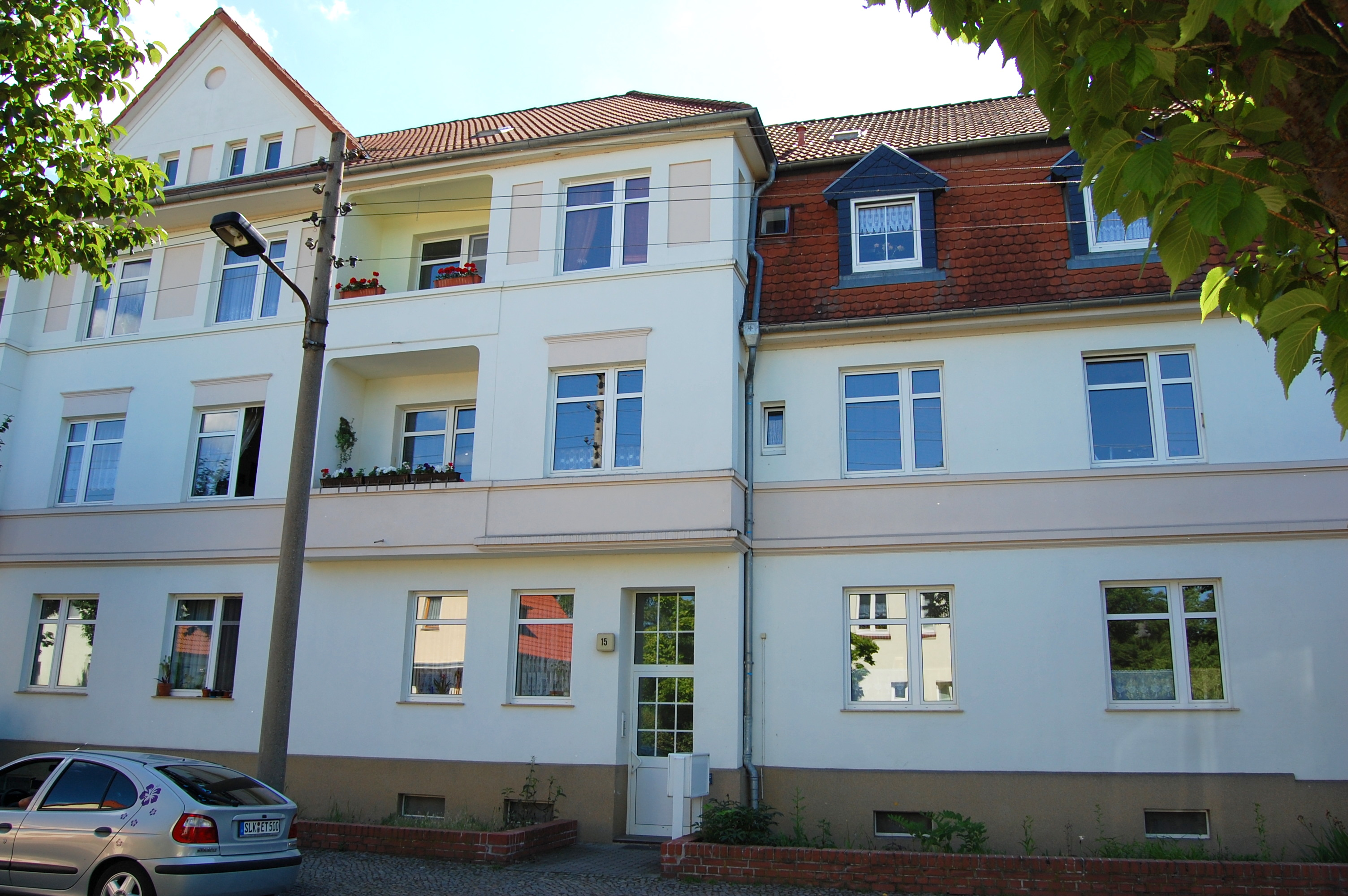 Gebäude Faberstraße 15 in Magdeburg-Fermersleben